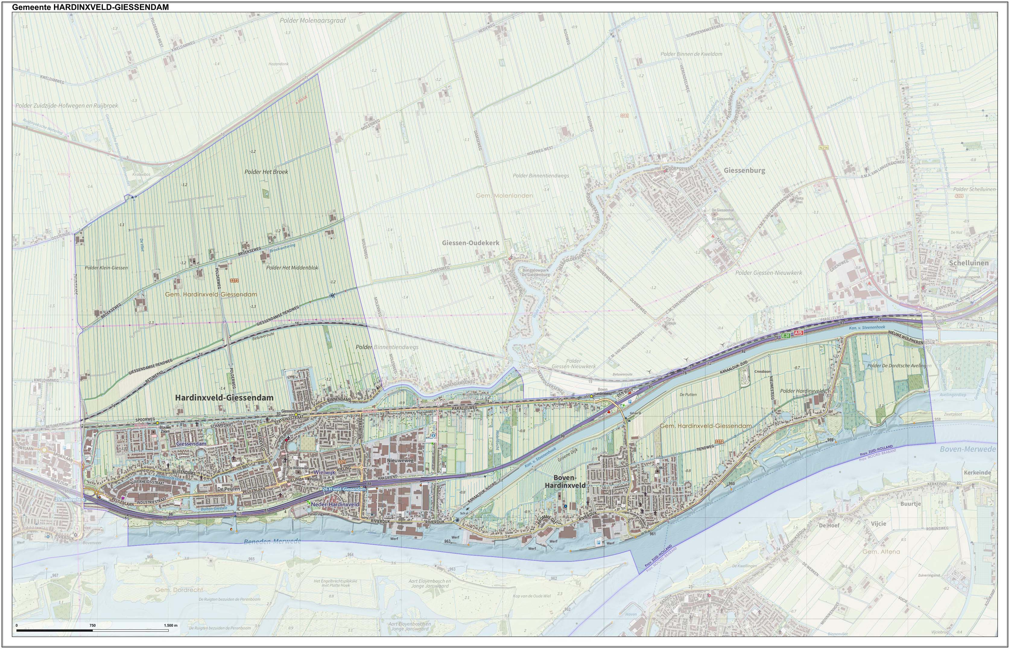 Topografische gemeentekaart. Resolutie: 400 pixels/km. Kaartbeeld samengesteld uit de open geodata van de Top10NL en Top25namen (Kadaster), Creative Commons-BY licentie. Gebouwvlakken uit open geodata BAG extract. Wegen uit de OpenStreetMap, OpenStreetMap community. Reliëfschaduw uit de Actuele Hoogtekaart AHN2. Samenstelling en kleurenschema: Jan-Willem van Aalst, met QGIS. Zie ook de Legenda.